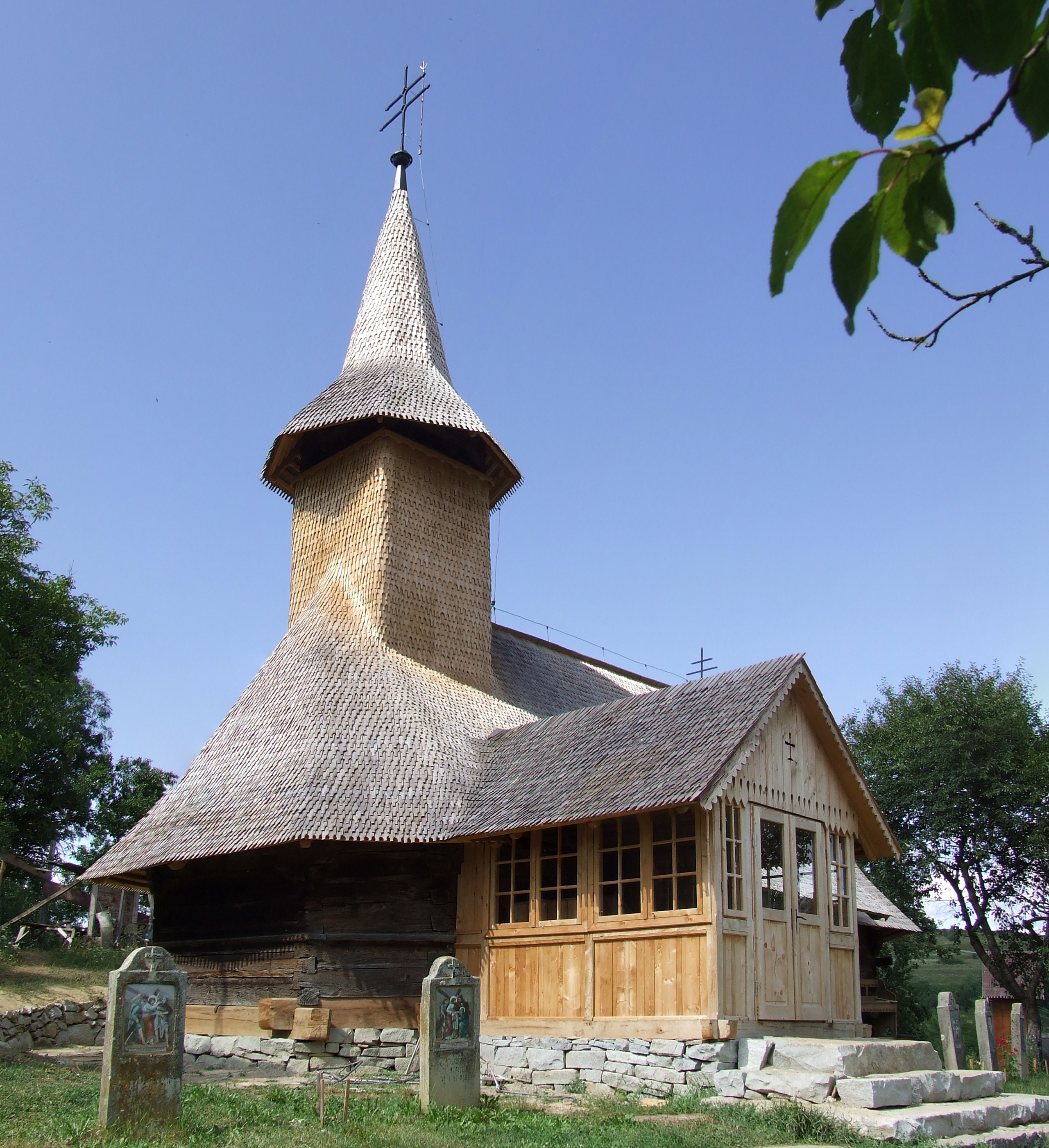 wooden church in Budurleni village, Romania